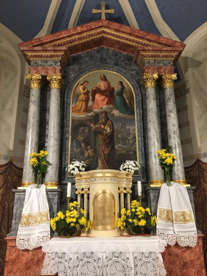 Oltar Sv. Martina, 2017.